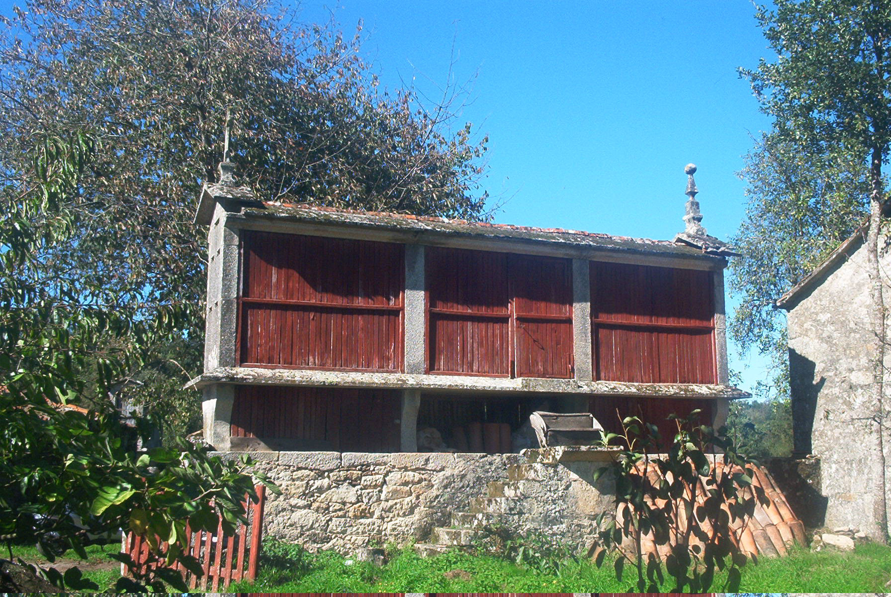 Hórreo en Fontelo (Antas de Ulla)